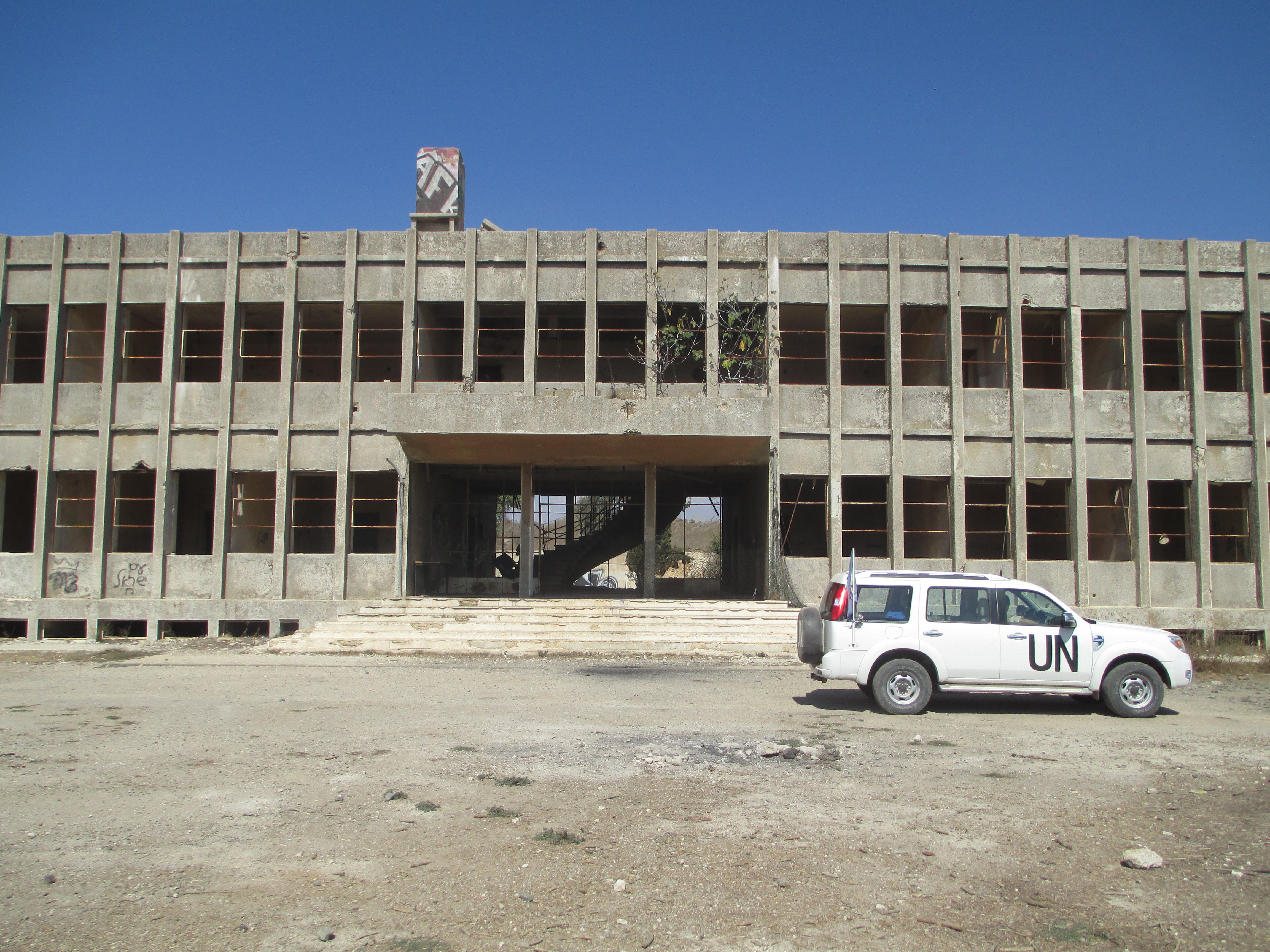 שביל אלי כהן - המפקדה הסורית בפאתי קוניטרה